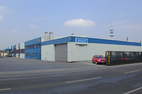 WILKA Schließtechnik GmbH (Velbert-Werk 2)